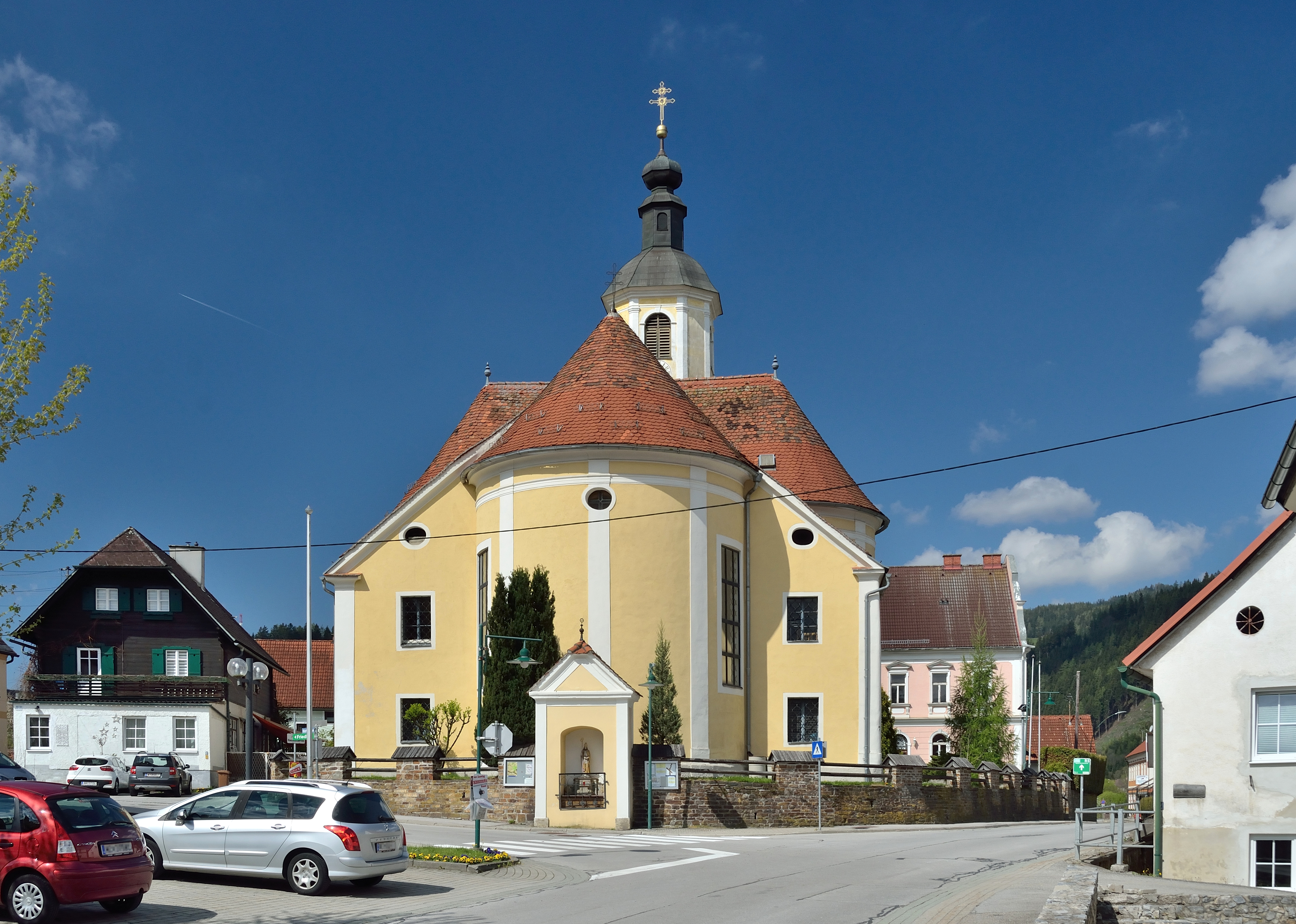 Die Pfarrkirche hl. Erhard, Wartberg im Mürztal, von Osten gesehen. Davor die Erhard-Kapelle.